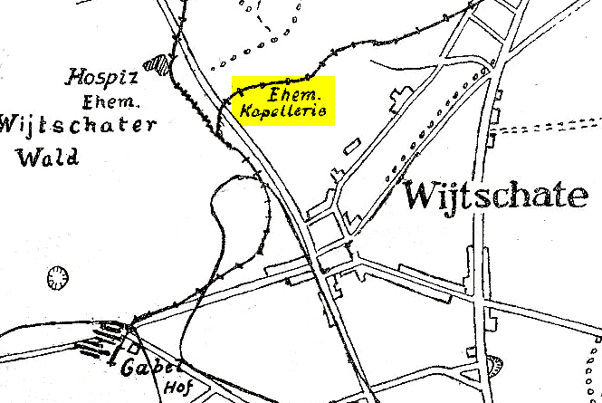 Rechtsschwenkung des I.R. 162 und Angriff auf Wytschaete